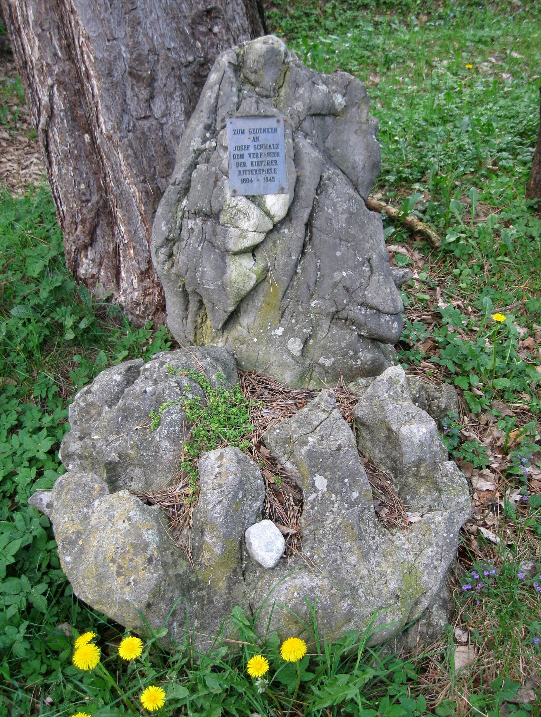 Gedenkstein für Josef Georg Schmalz vor dem Theaterstadl, Ritterschauspiele Kiefersfelden